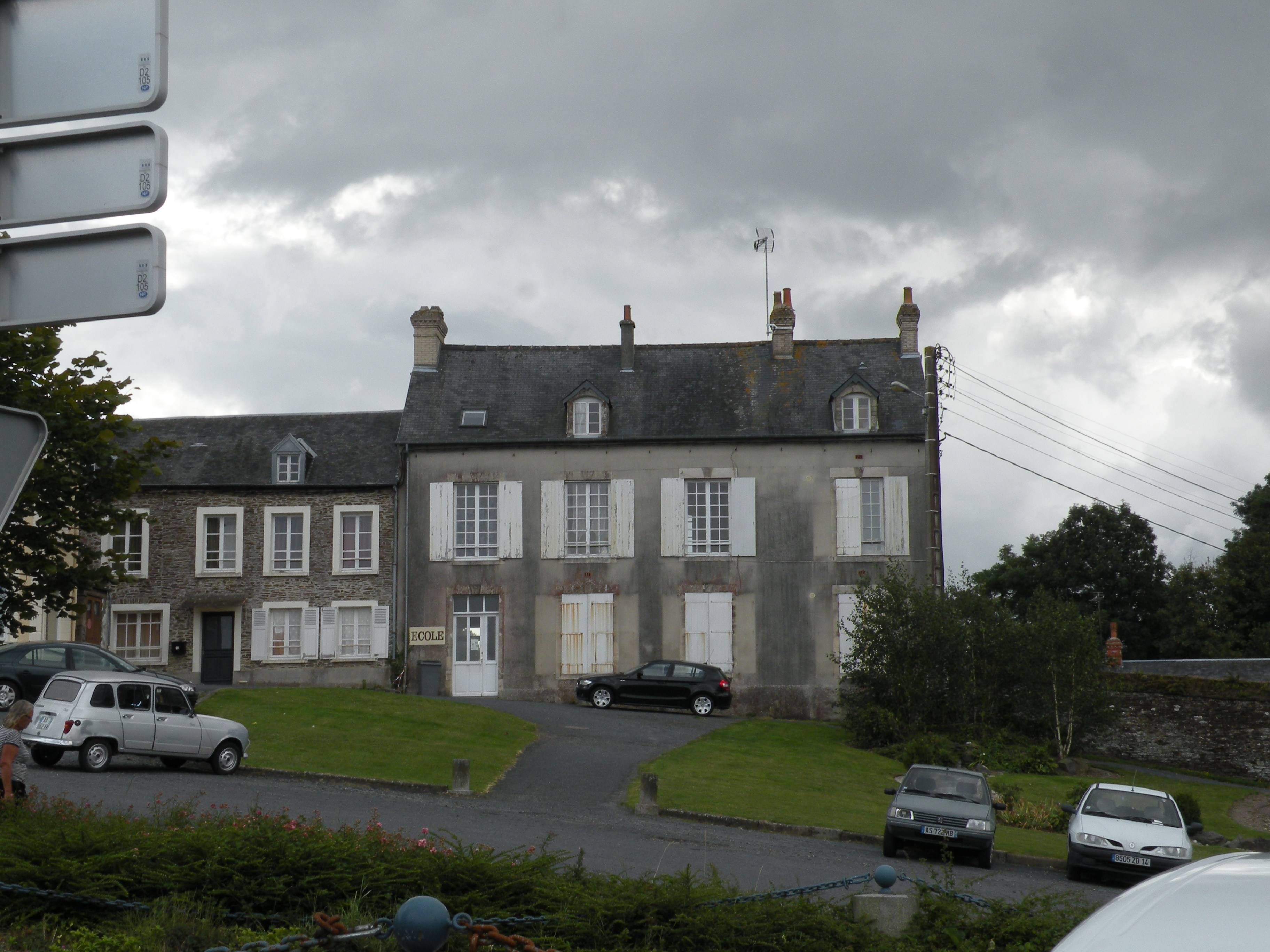 Balleroy école